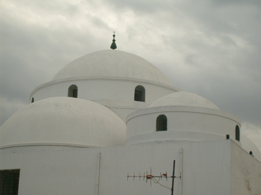 Dômes de la mosquée Sidi Mahrez à Bab Souika (Tunis)